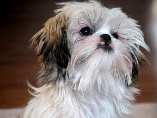 Shih Tzu - 6 Months